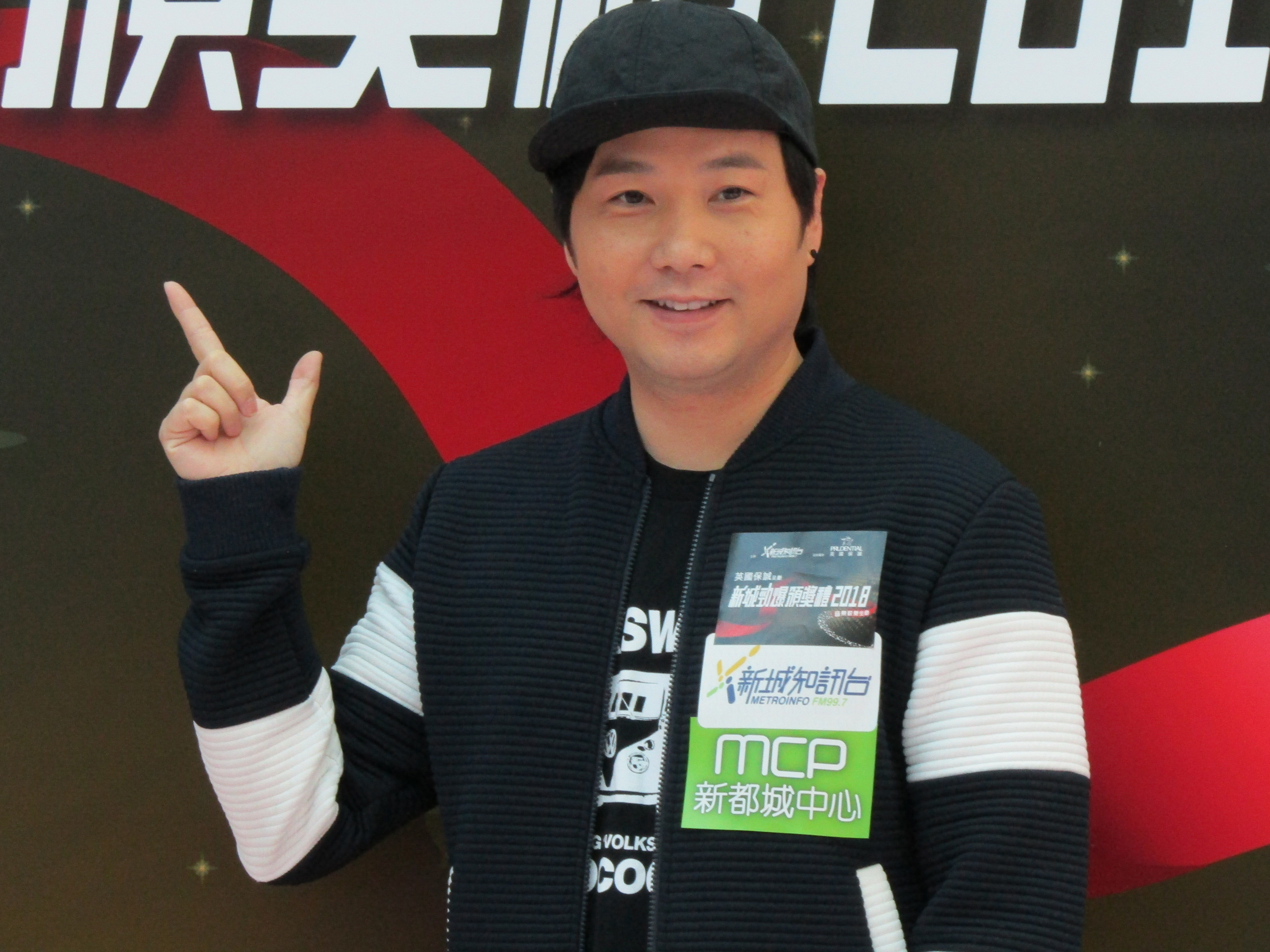 中文（香港）: 葉文輝於新都城中心二期演出